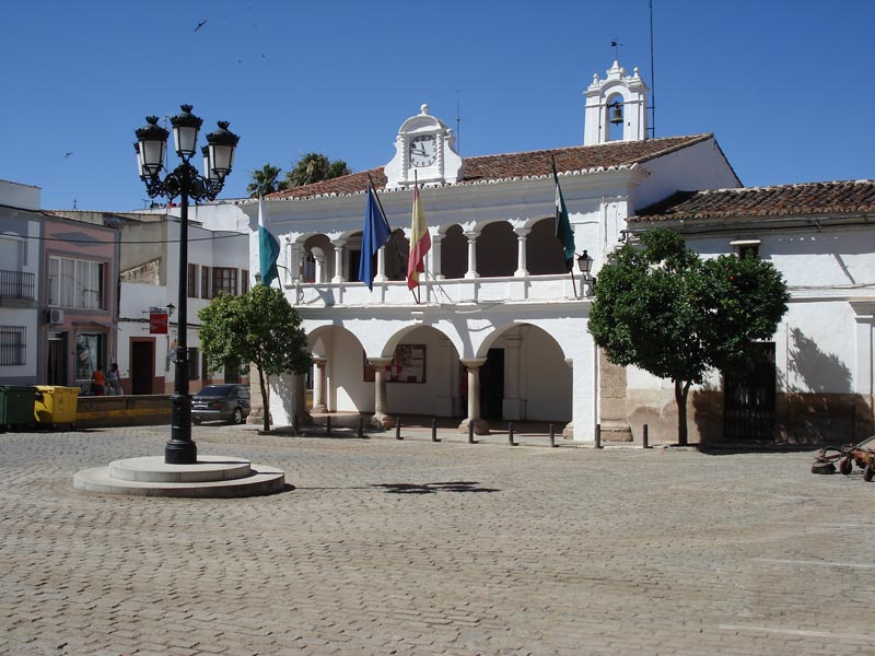 Plaza de España y Ayuntamiento